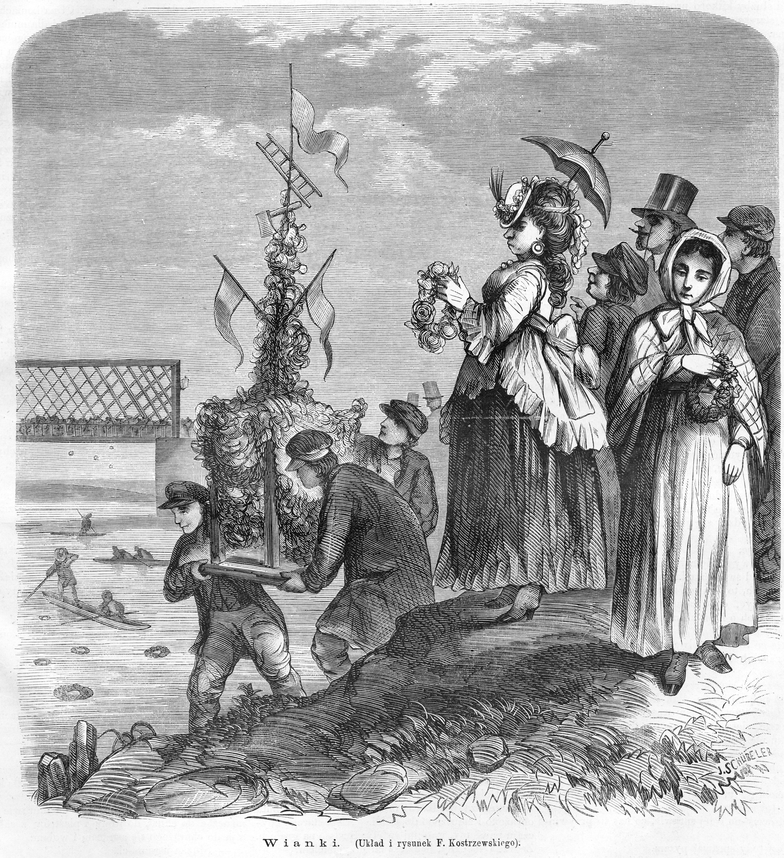 Wianki